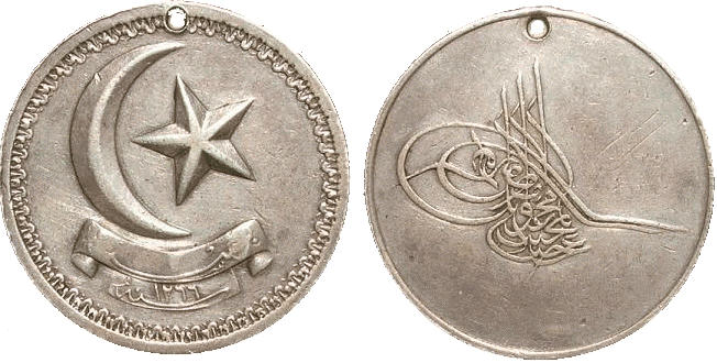 Bosna Madalyası 37 mm. 22.7 gr. (H.1266, M.1849)